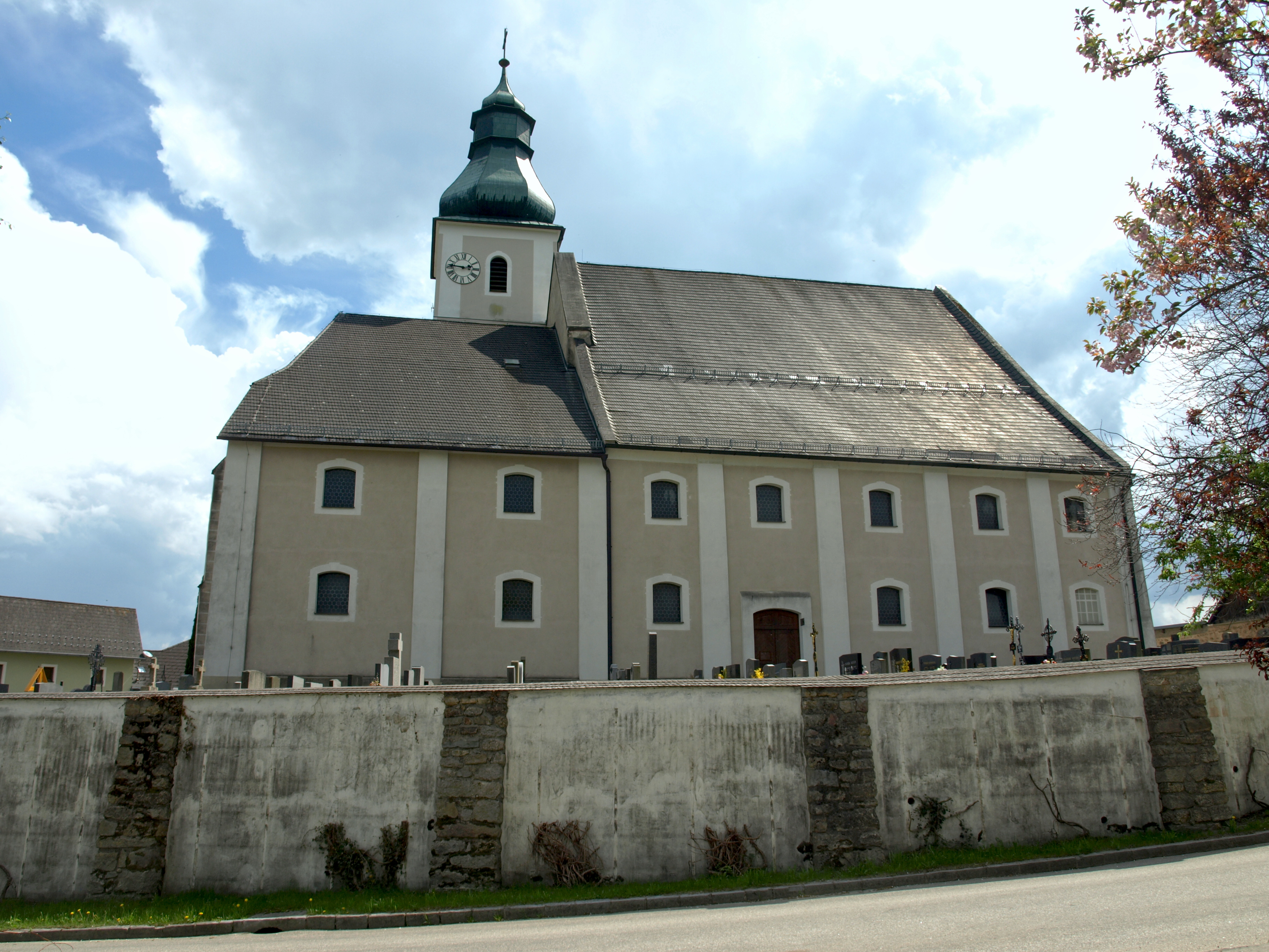 Kath. Pfarrkirche Mariä Geburt und Friedhof